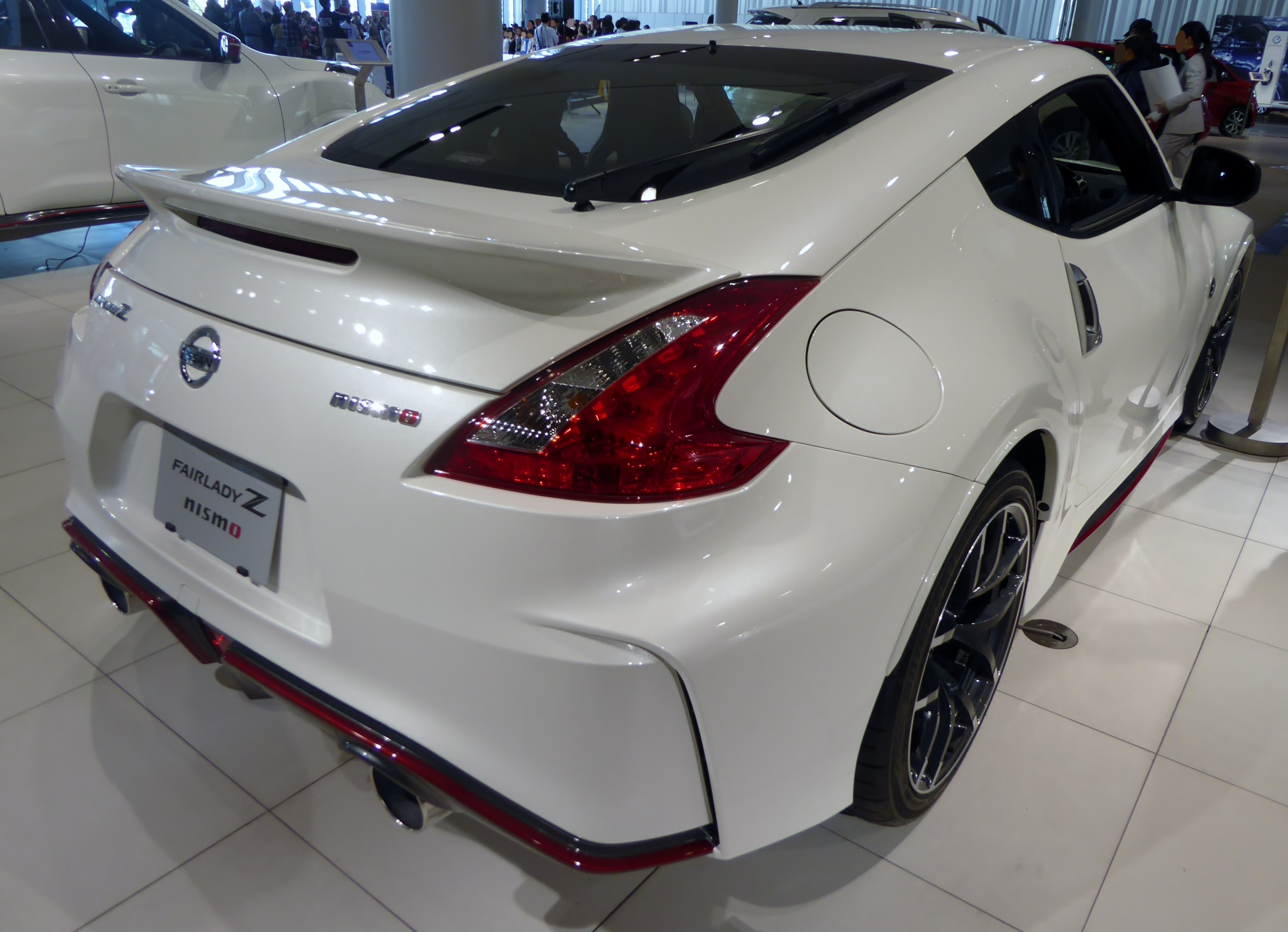 CBA-Z34型日産・フェアレディZニスモをリアから撮影。